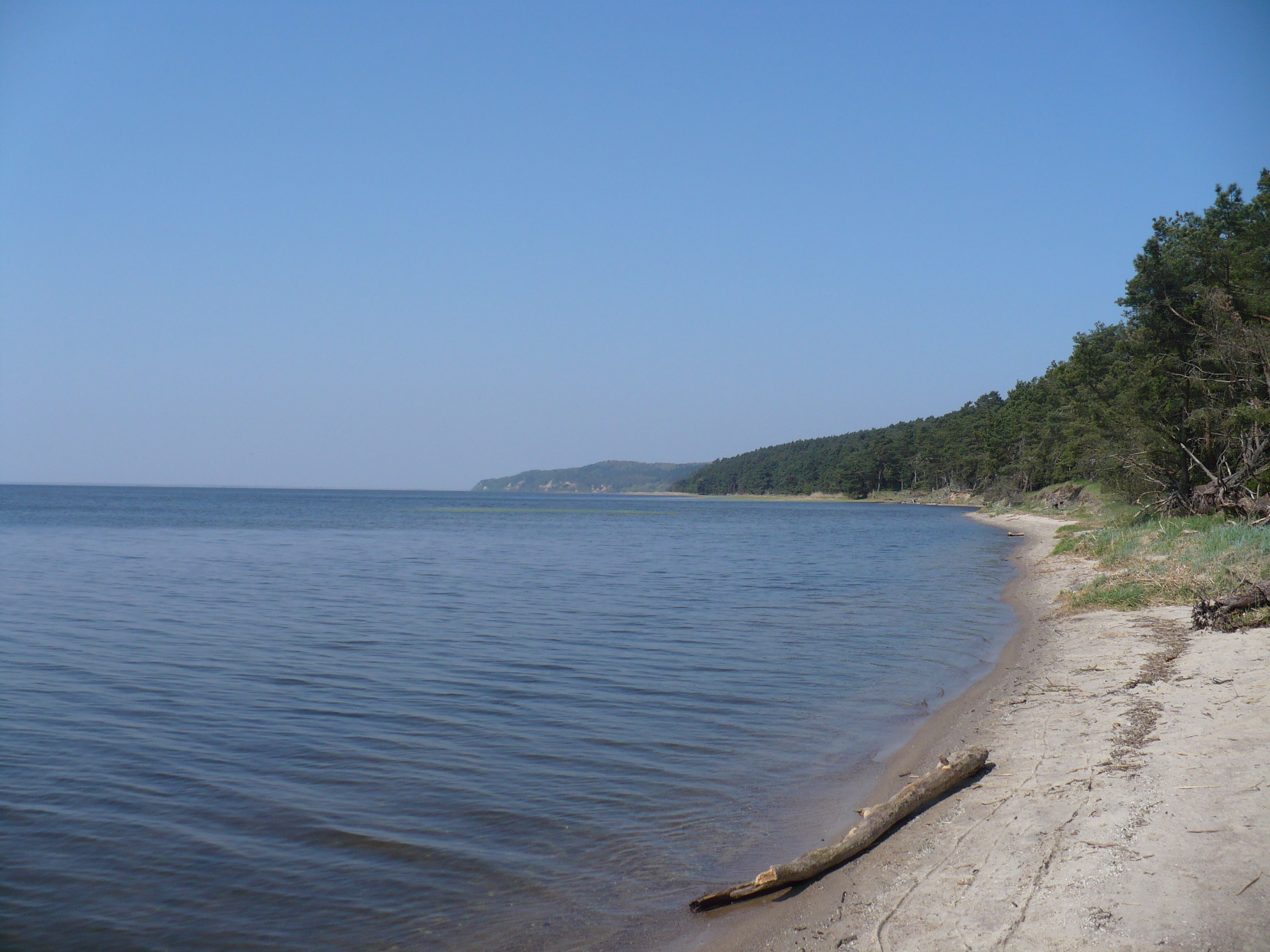 Woliński Park Narodowy - Karnocice